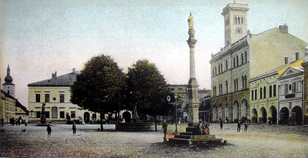 Pohlednice 1909 (Czech Republic)